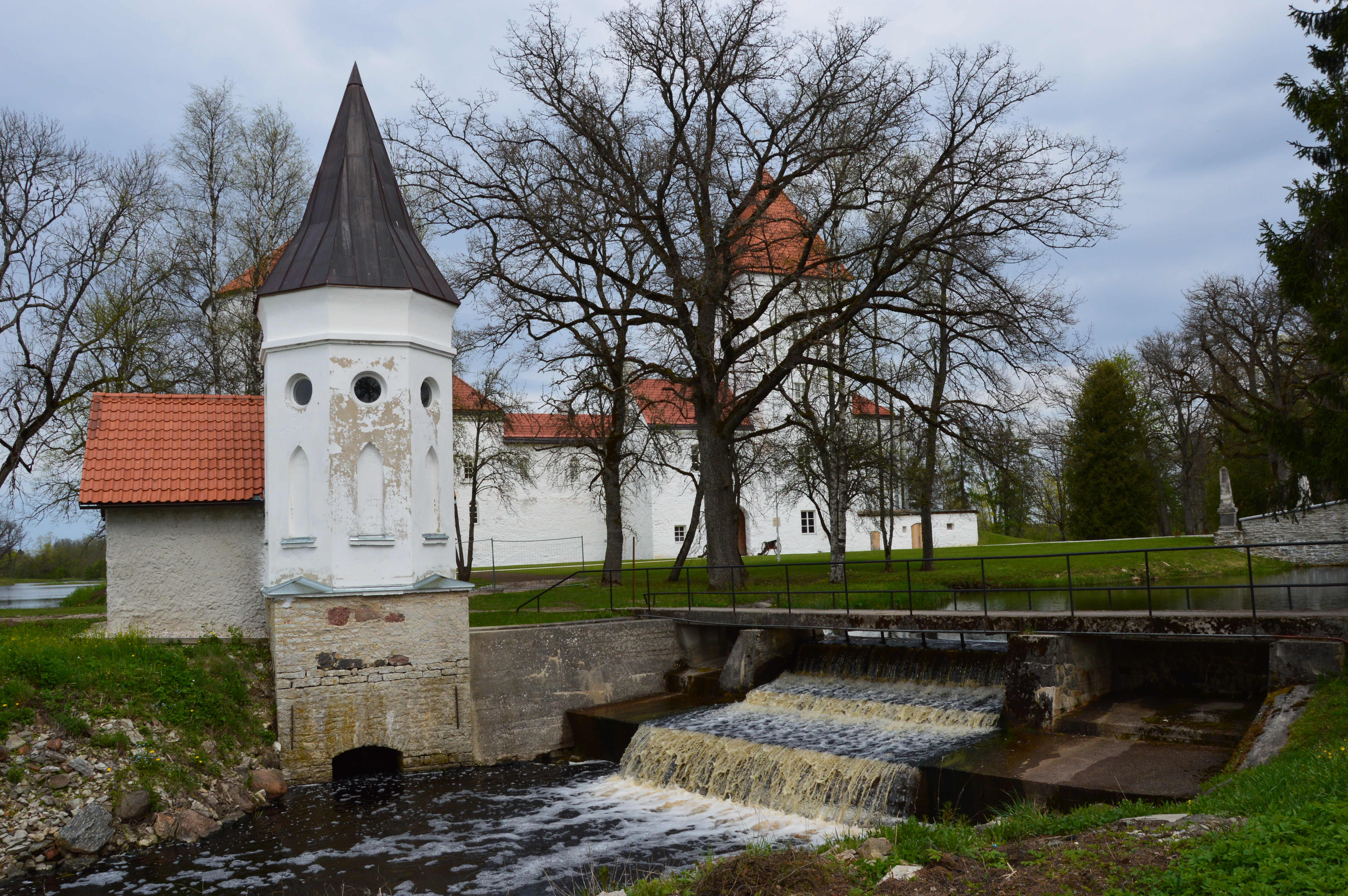 Koluvere mõisa turbiinihoone ja loss.